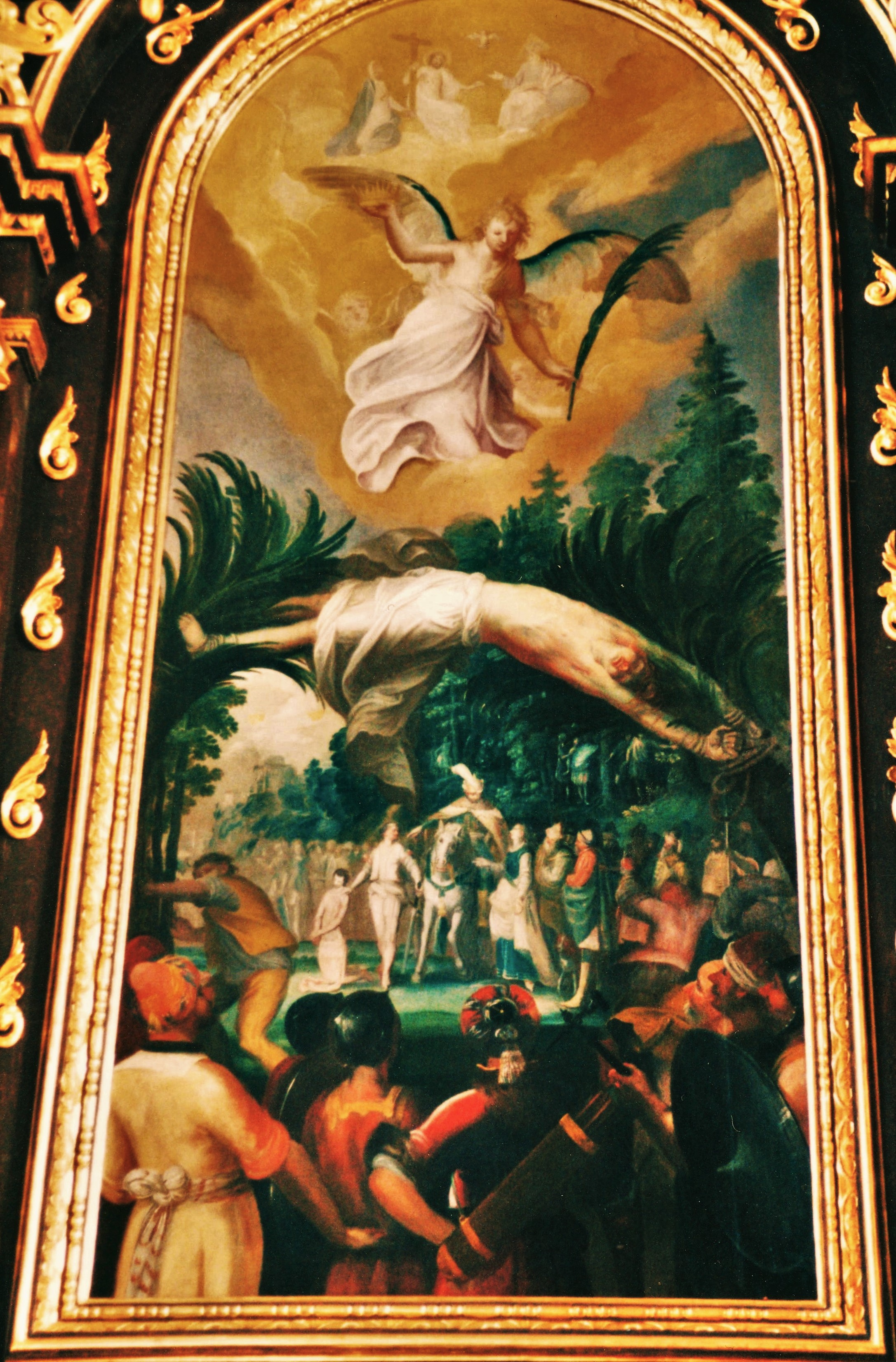 Wallfahrtskirche Sammarei, Gemälde des nördlichen Seitenaltars (um 1647): Martyrium der heiligen Corona